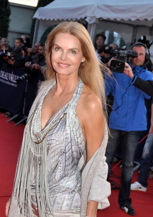 Cyrielle Clair au festival de Deauville